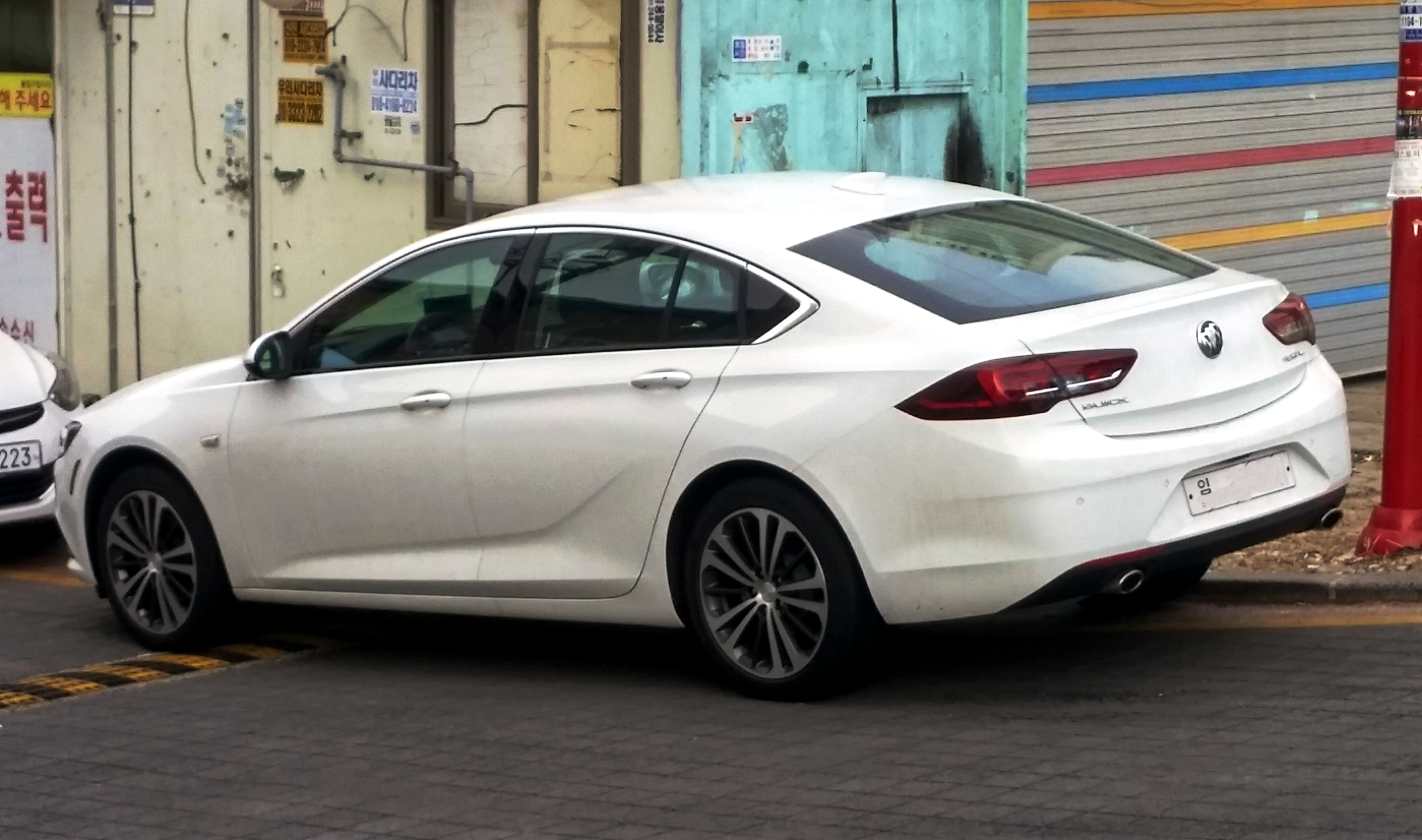 뷰익 리갈 테스트카